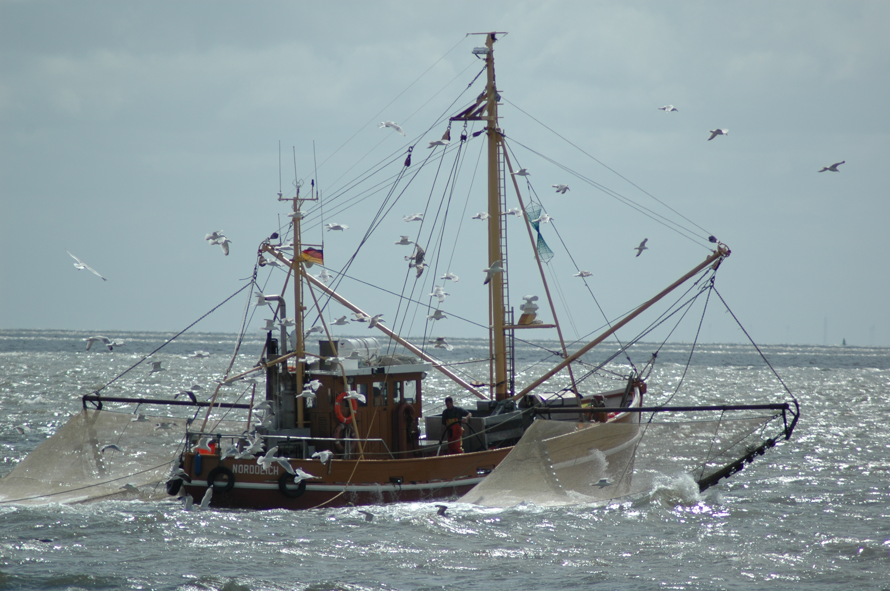 Fischkutter vor Norderney